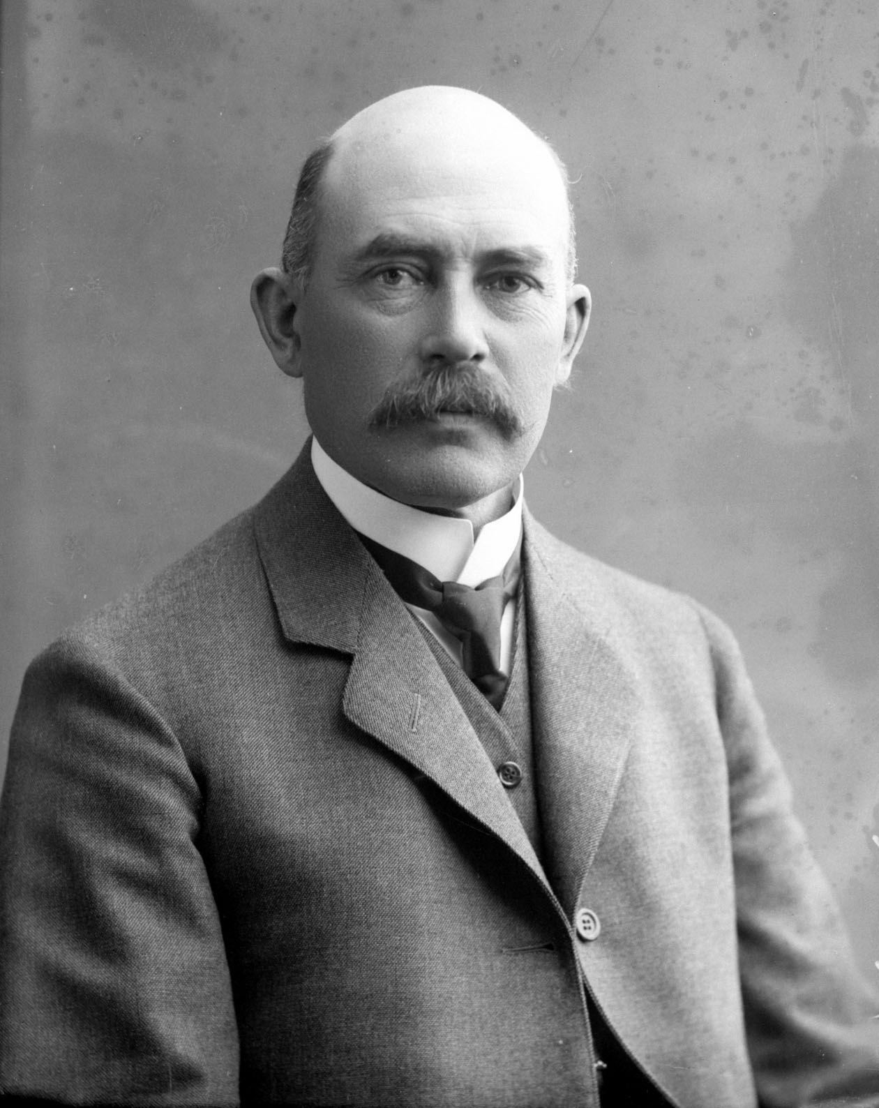 Bernt Holtsmark (1859–1941), gårdbruker, landbruksskolebestyrer og politiker (Høyre/Frisinnede Venstre).